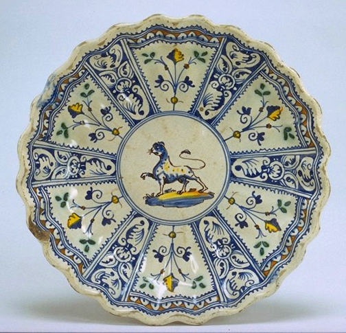 Crespina dipinta a quartieri con al centro un felino in stile compendiario. Montelupo, prima metà del XVII secolo.